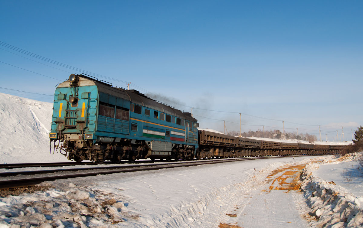 Тепловоз 2ТЭ116-1106 (секция Б) следует обратной стороной вперёд с грузовым поездом. ОАО "Учалинский горно-обогатительный комбинат", перегон Рудная - Узельга, Башкортостан, Россия